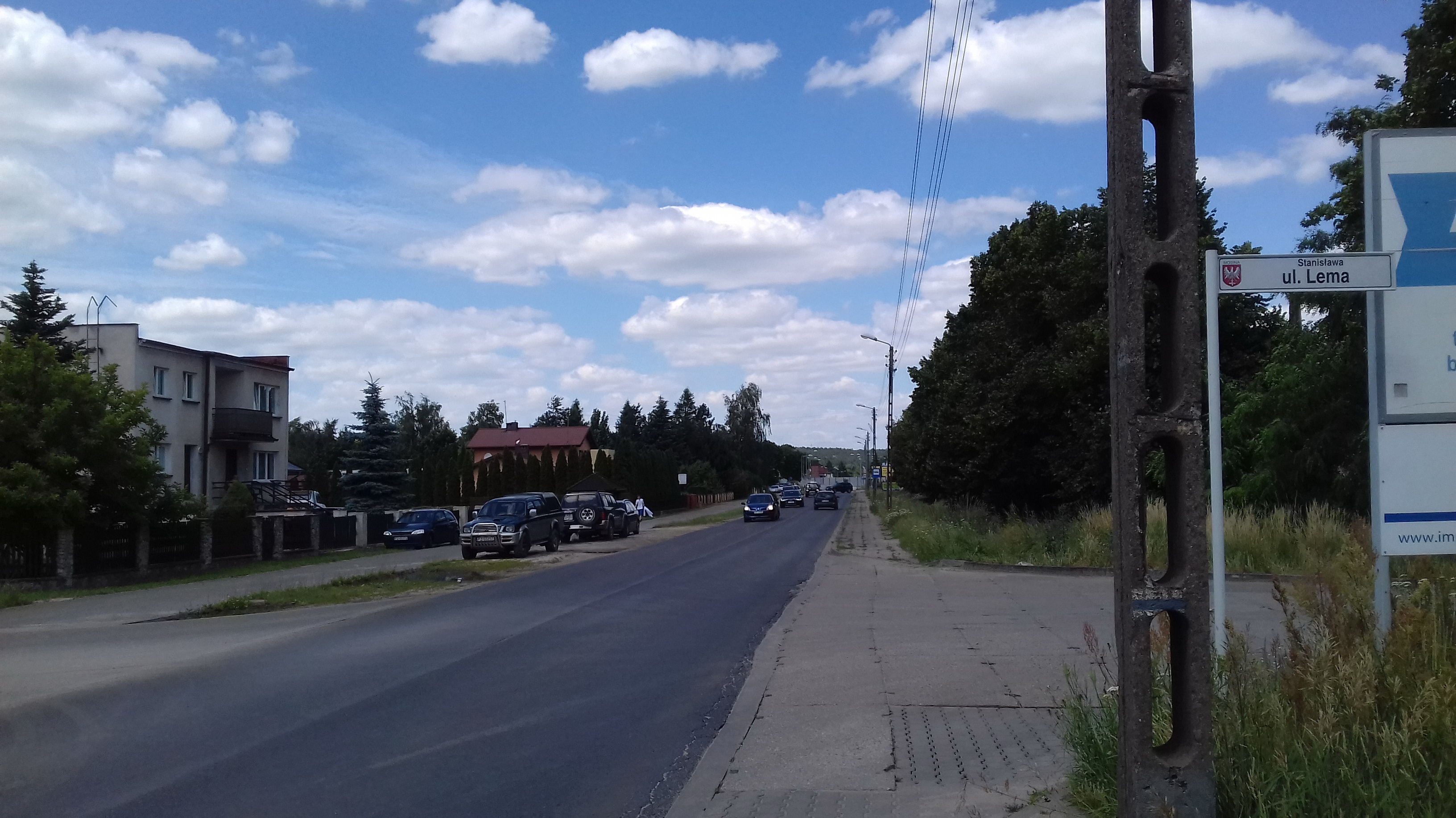 Oznaczenie szlaku turystycznego nr 3583 w Mosinie przy skrzyżowaniu ulic Śremskiej i Lema.